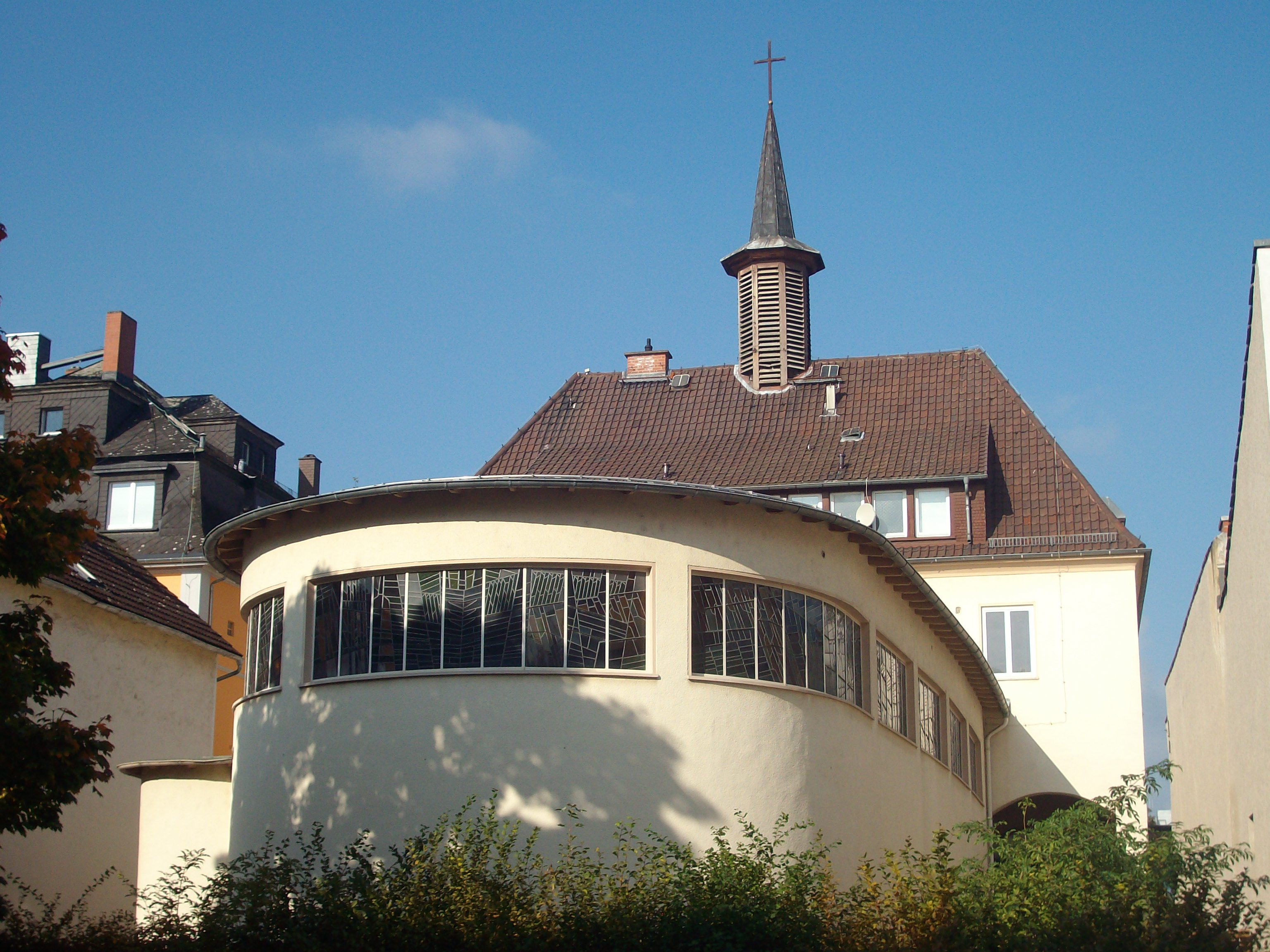 Lukaskirche, Gießen, Hessen, Deutschland